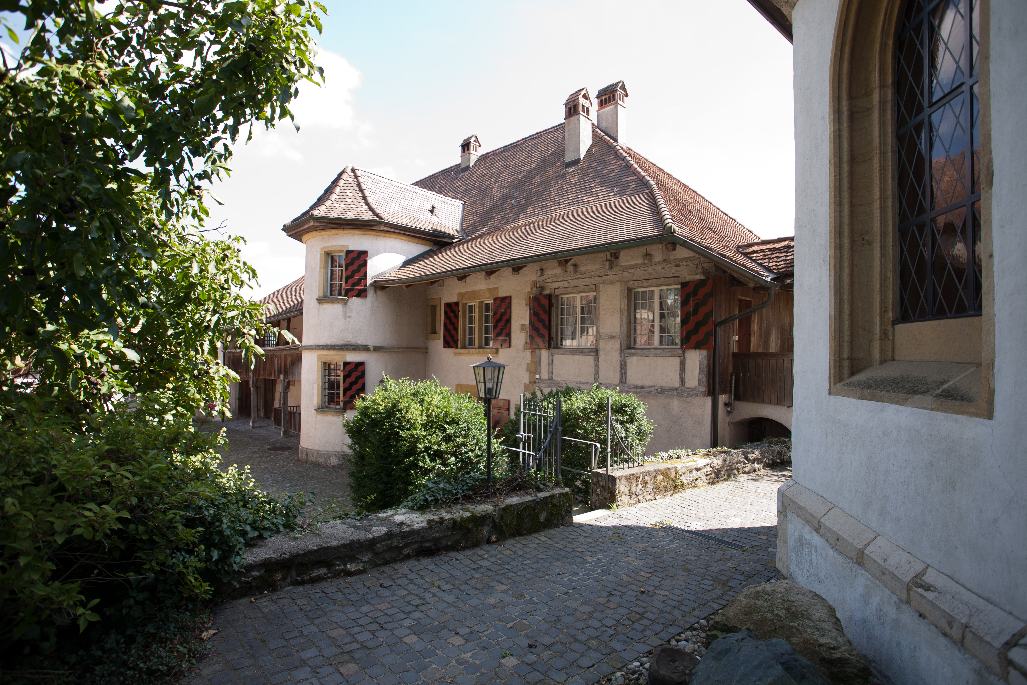 Walperswil Pfarrhaus